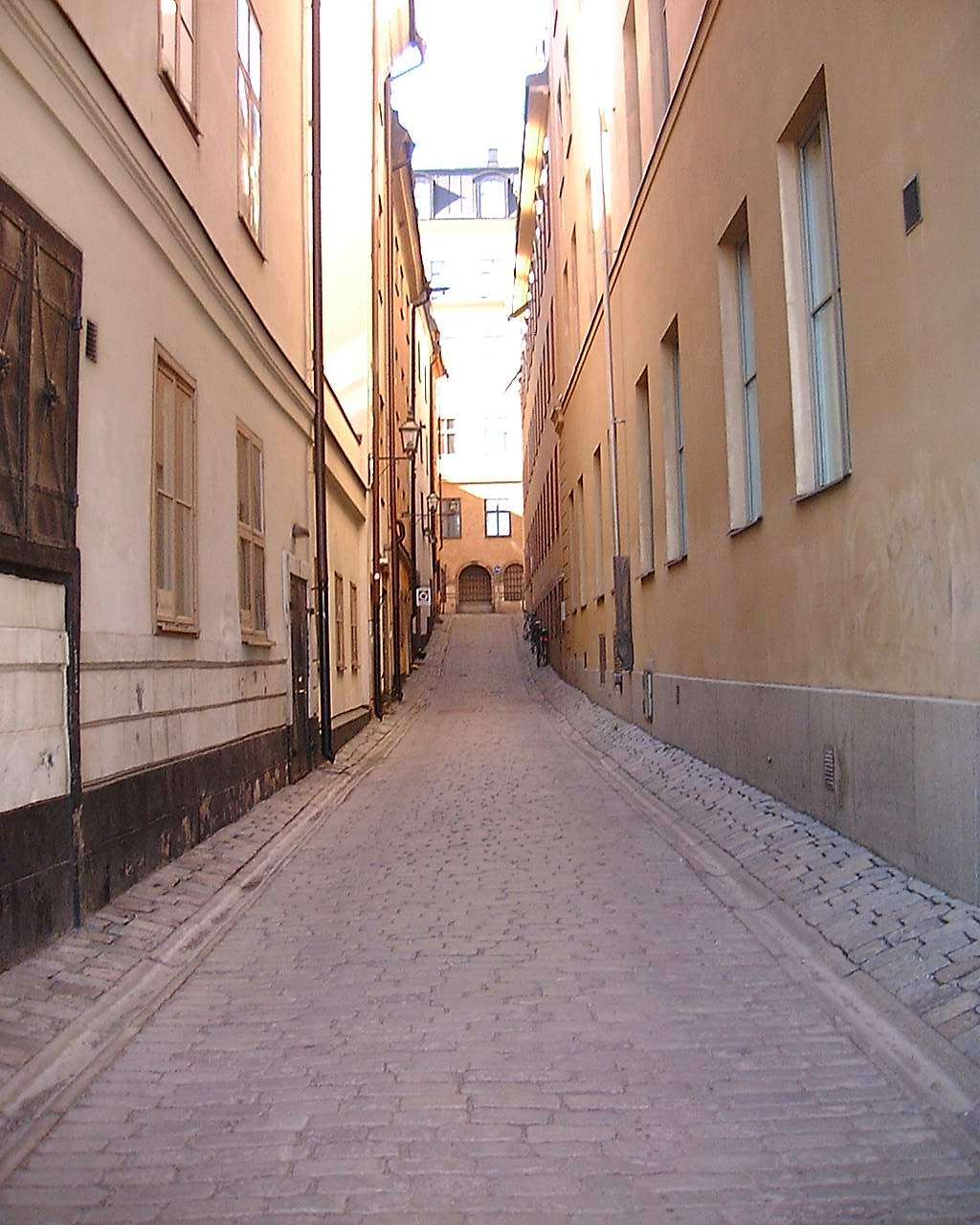 Telegrafgränd, Gamla stan, Stockholm.